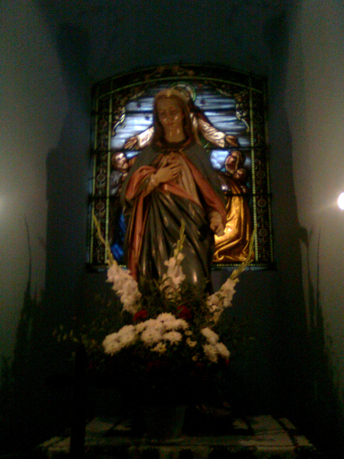 Biserica parohială romano-catolică "Sf. Treime", fostă biserică iezuită